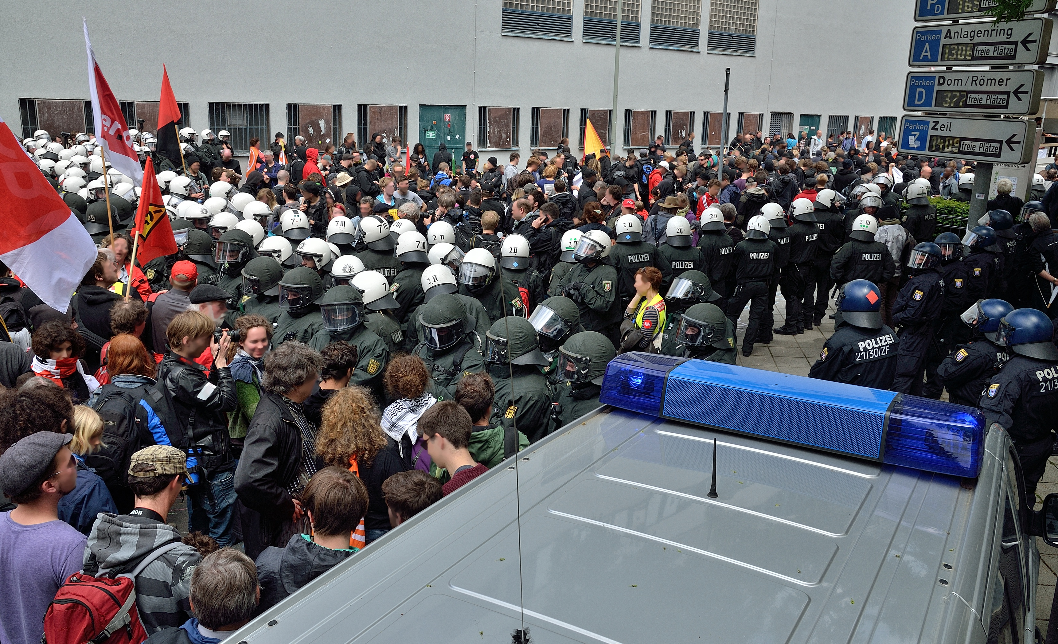 Blockupy 2013: Spaltung und Einkesselung der Demonstration durch die Polizei. Die Gesichter von Demonstranten wurden durch den Fotografen unkenntlich gemacht.